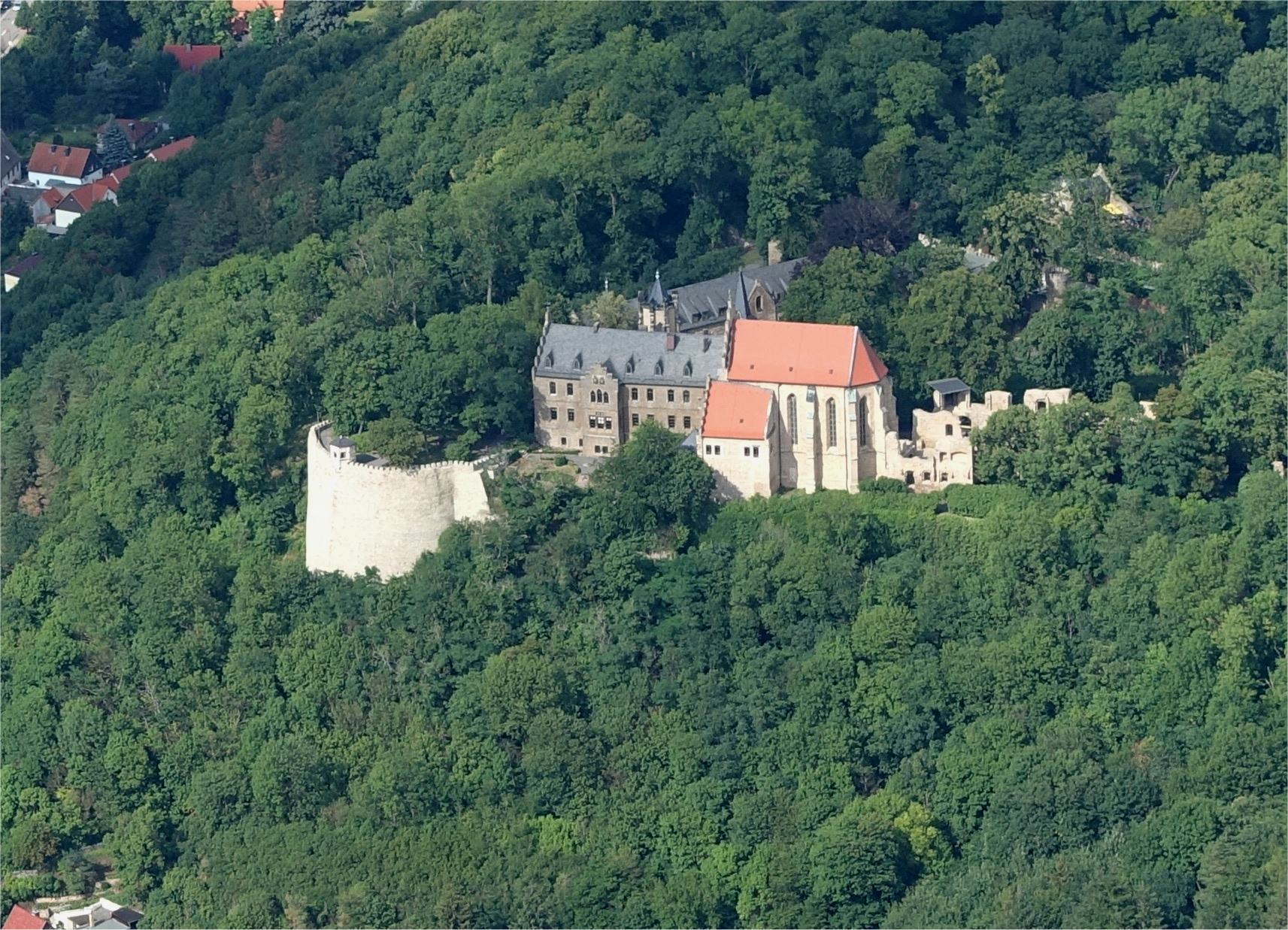 Luftbild von Schloss Mansfeld 2017